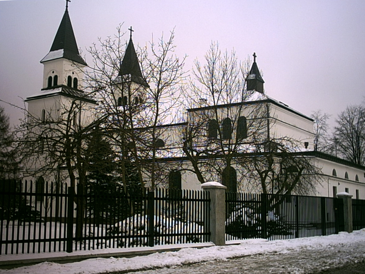 Kościół Matki Boskiej Królowej Pokoju Warszawa Młociny (3 czerwca 2007).